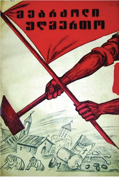 მარგალური: საბჭოთა კავშირის მებრძოლ უღმერთოთა კავშირის ქართულენოვანი ჟურნალი «მებრძოლი უღმერთო»